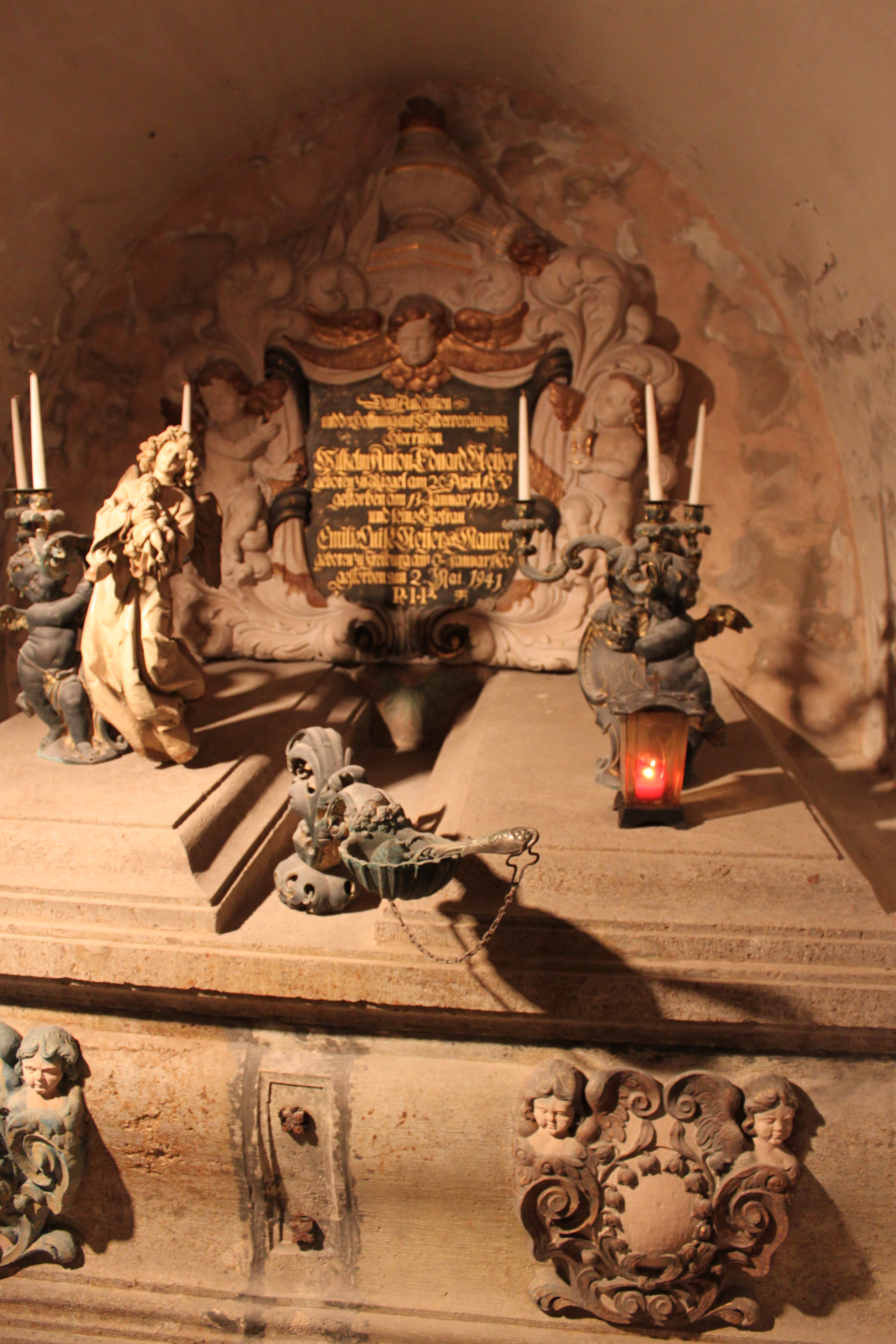 Sarg in der Gruft der Friedhofskapelle in Riegel am Kaiserstuhl. Im Sarg liegt der Brauereibesizter Wilhelm Meyer † 1909. Dies ist der einzige Sarg in der Gruft.